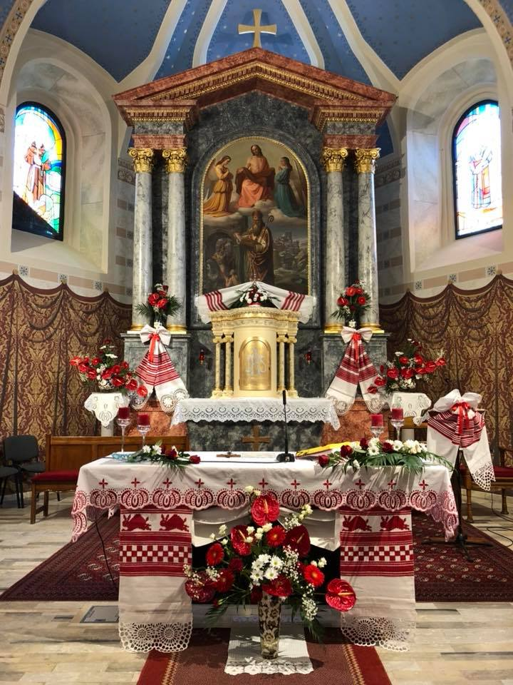 Crkva u Bošnjacima, oltar na Trojstvo 2018.